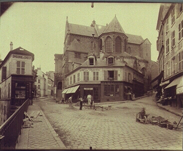 Pontoise (France) Vue de la façade arrière de la cathédrale St Maclou